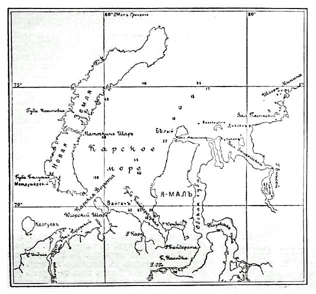 Это изображение было использовано для иллюстрирования статьи «Карское море» опубликованной в двенадцатом томе «Военной энциклопедии», который был издан книгоиздательским товариществом И. Д. Сытина в 1913 году в столице Российской империи городе Санкт-Петербурге. Более подробное описание к этой картинке можно прочесть в указанной выше статье.